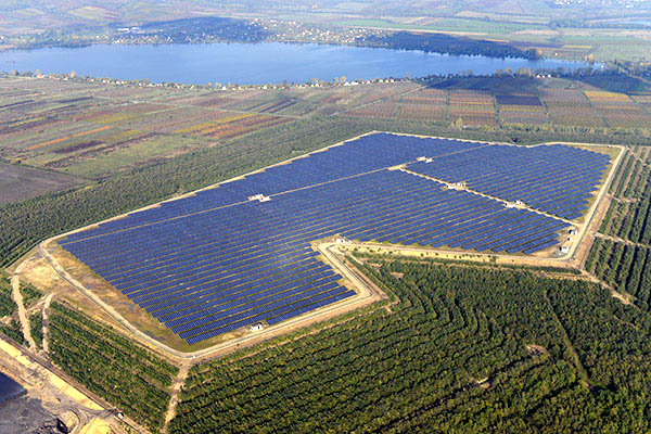 Fotovoltaikus napelemekből álló naperőmű Visontán.